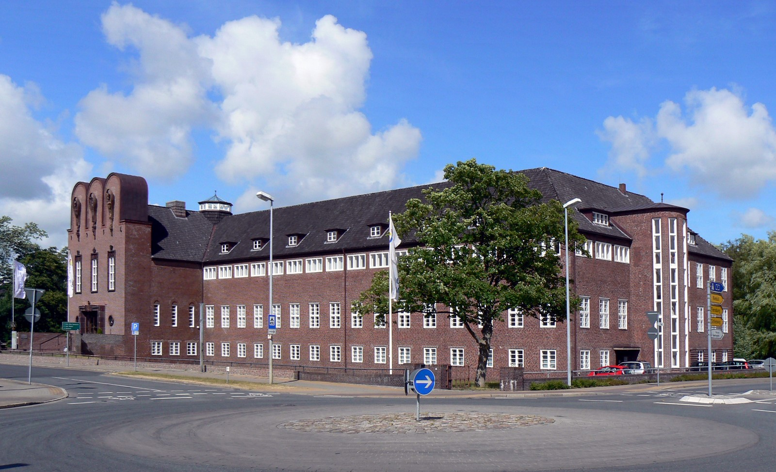 Das Ludwig-Nissen-Haus in Husum mit dem NordseeMuseum und der Stadtbücherei.